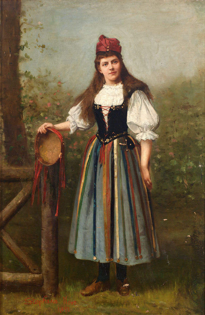 Junge Frau in Gartenlandschaft an Holztor lehnend. In ihrer Rechten ein Tamburin haltend und eine italienische Tracht tragend.